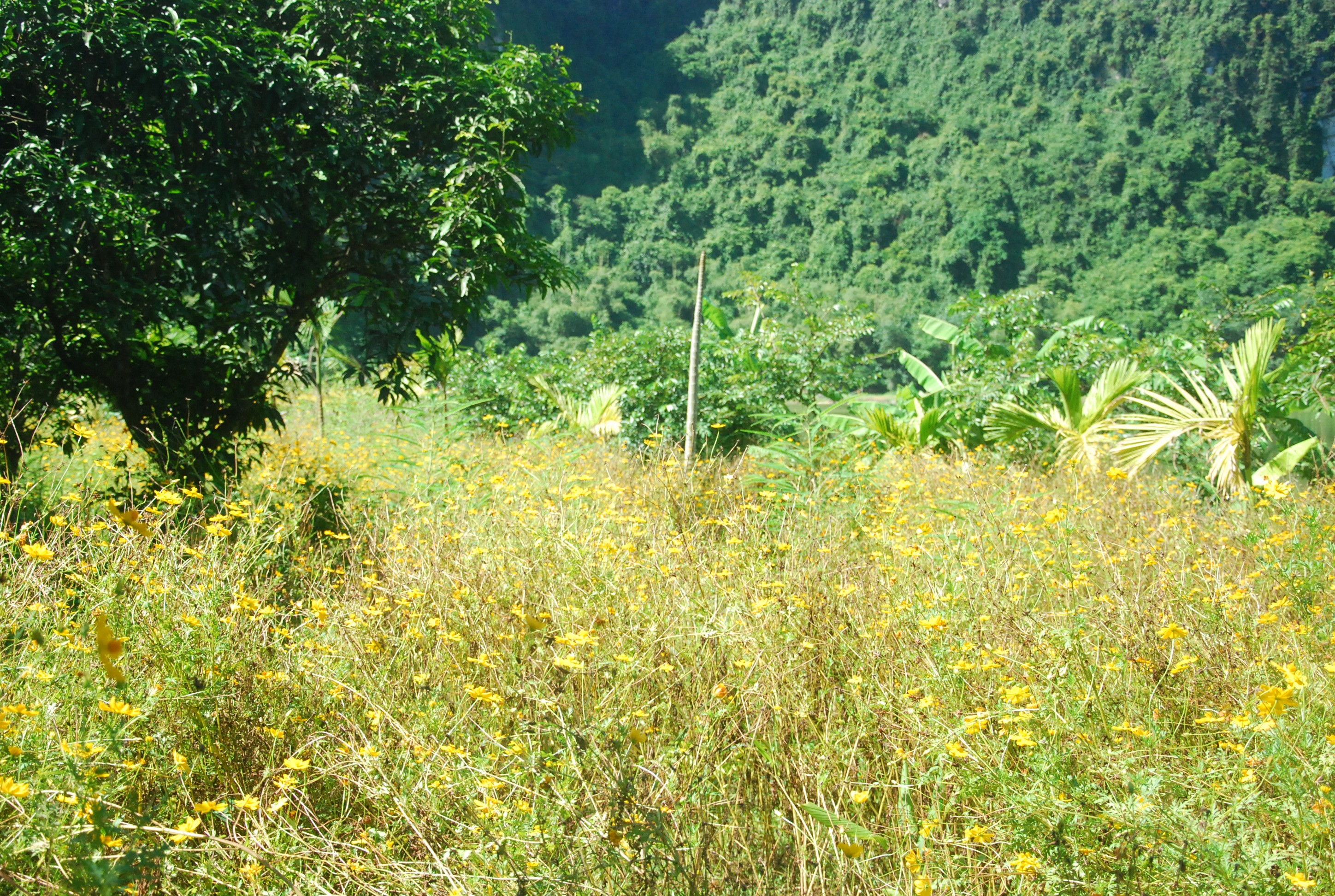 Phong cảnh Khu du lịch sinh thái Thung Nham ở Ninh Bình